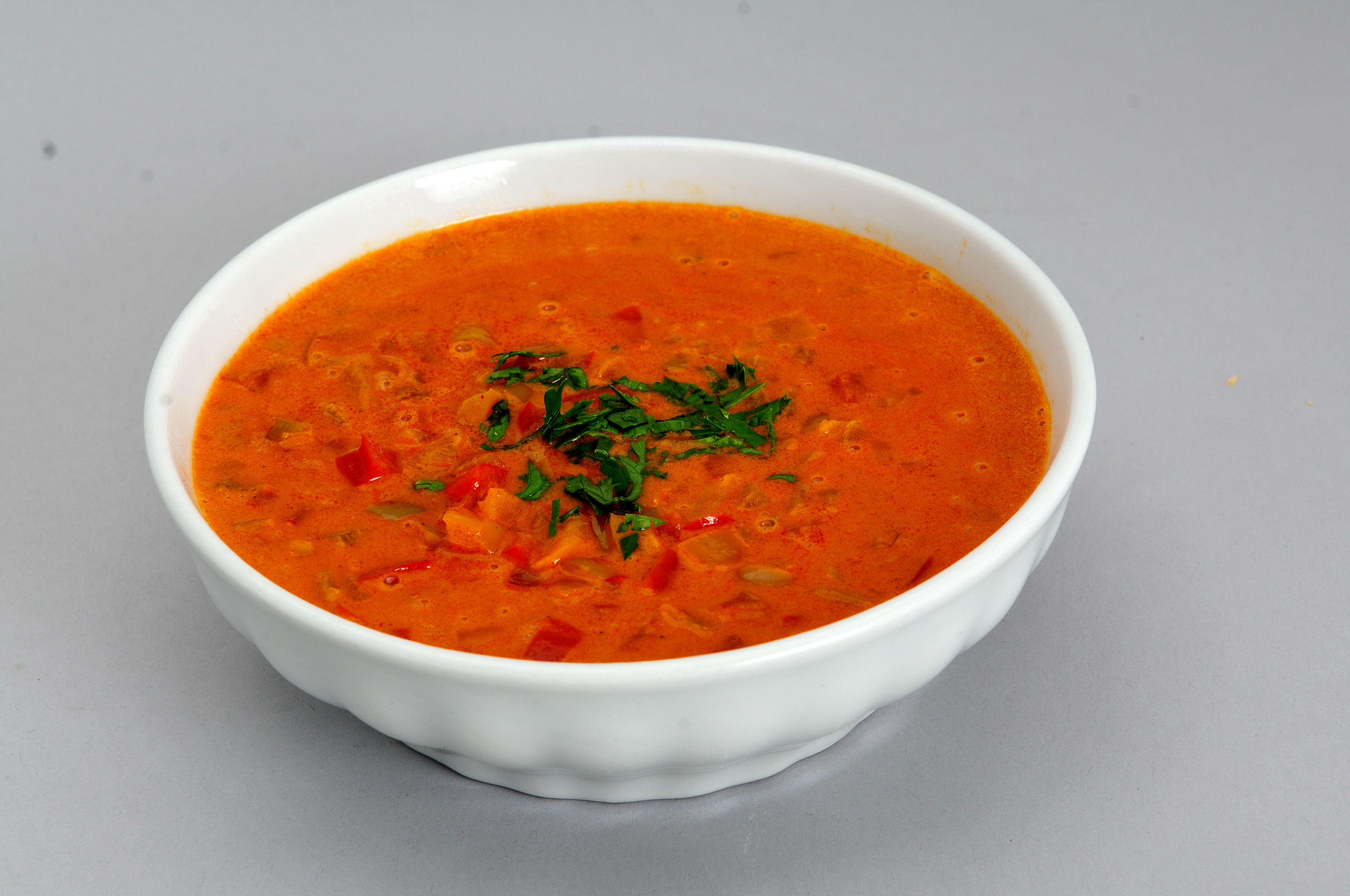 Paprikasauce mit Rahm. Treffen der Redaktion Essen und Trinken in Wien.